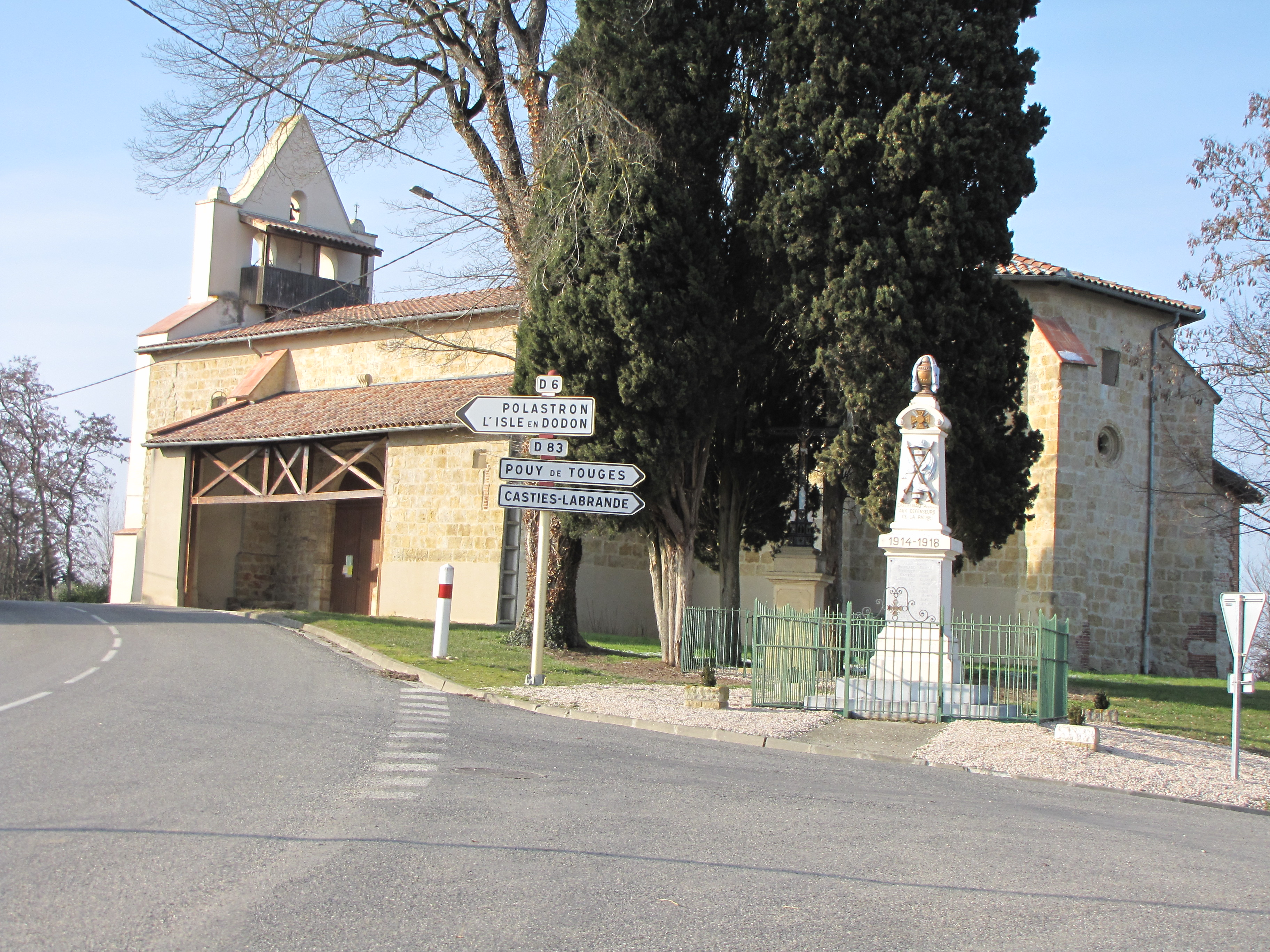 Église de Castelnau-Picampeau